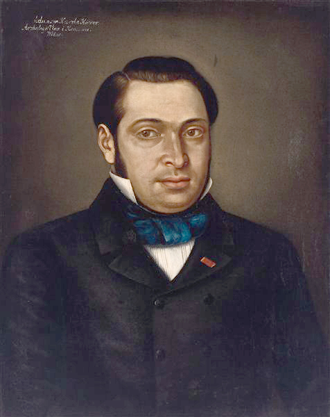 Беларуская (тарашкевіца): Адам Кіркор